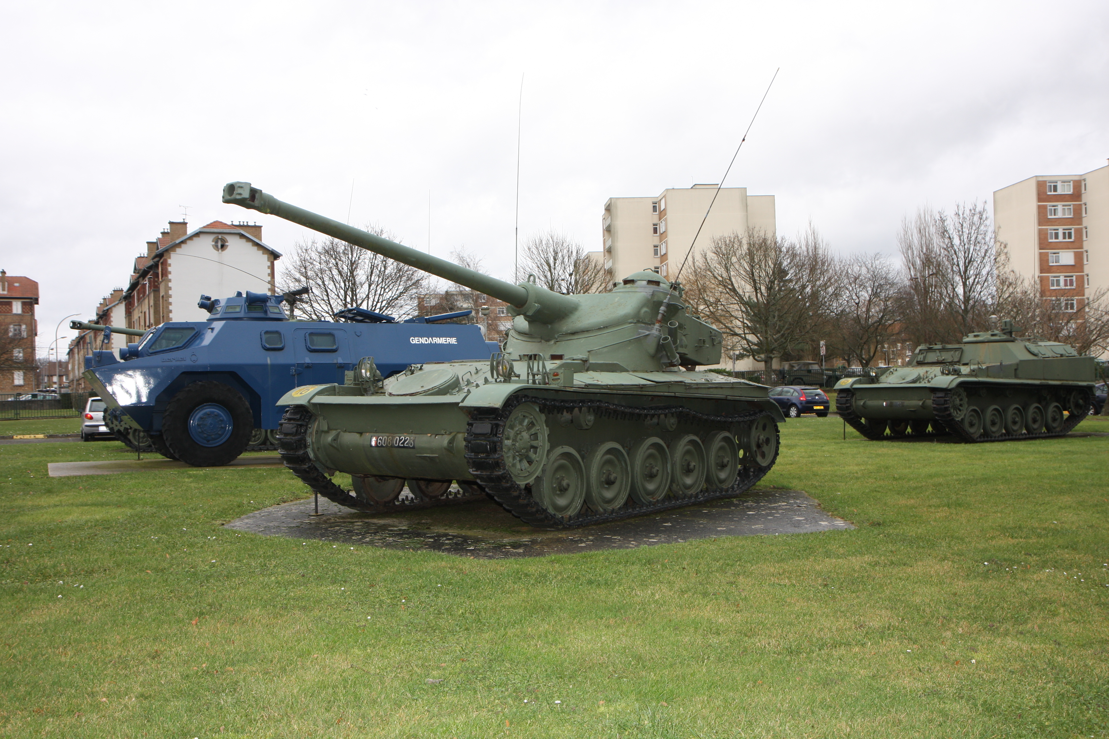 AMX 13, AMX 13 VTT et VBRG - Satory